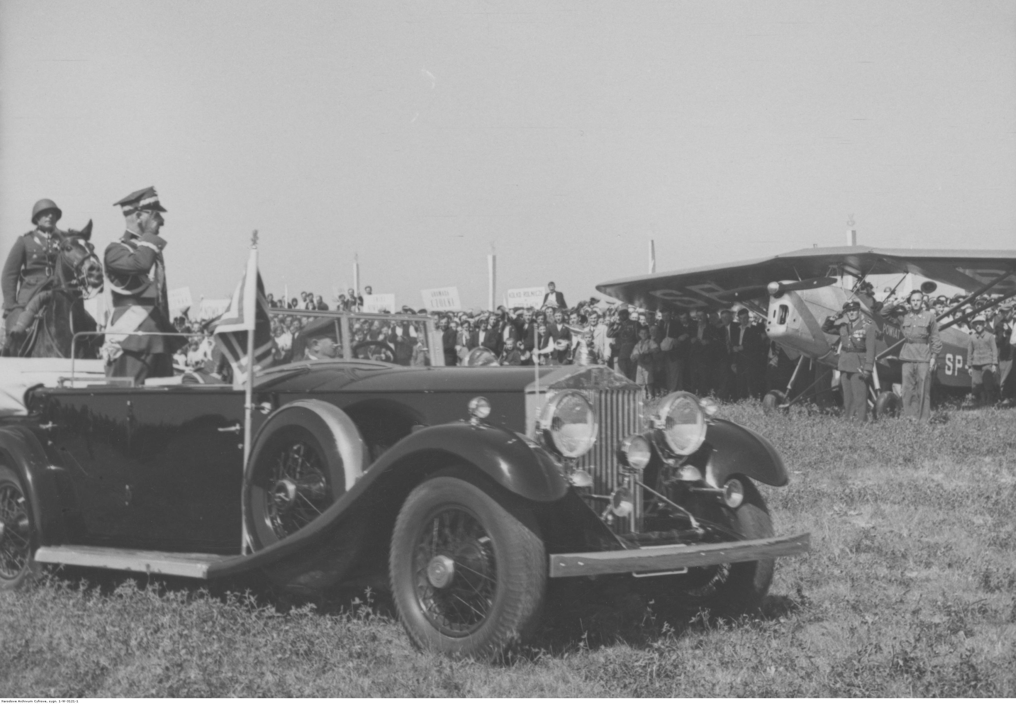 Wręczanie sztandaru 3 Pułkowi Artylerii Lekkiej Legionów w Zamościu, ufundowanego przez mieszkańców Zamościa. Marszałek Edward Rydz-Śmigły, w samochodzie Rolls-Royce, witany przez komitet organizacyjny i mieszkańców Zamościa. W tle widoczny samolot RWD-8; lipiec 1938 r. Koncern Ilustrowany Kurier Codzienny - Archiwum Ilustracji. Sygnatura: 1-W-3121-1